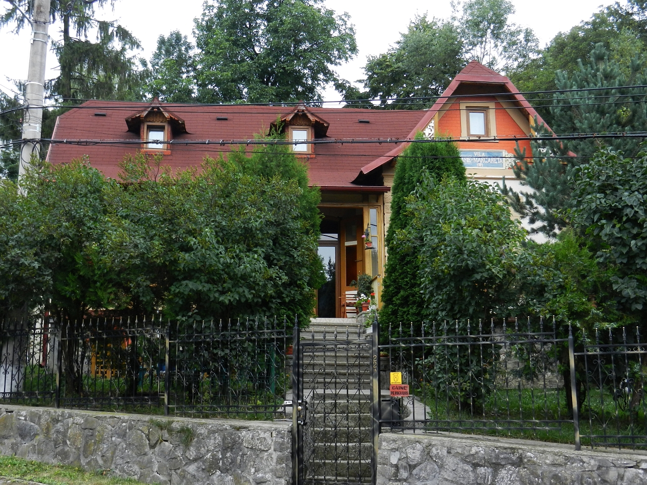 Vila Alexandrina Angelescu